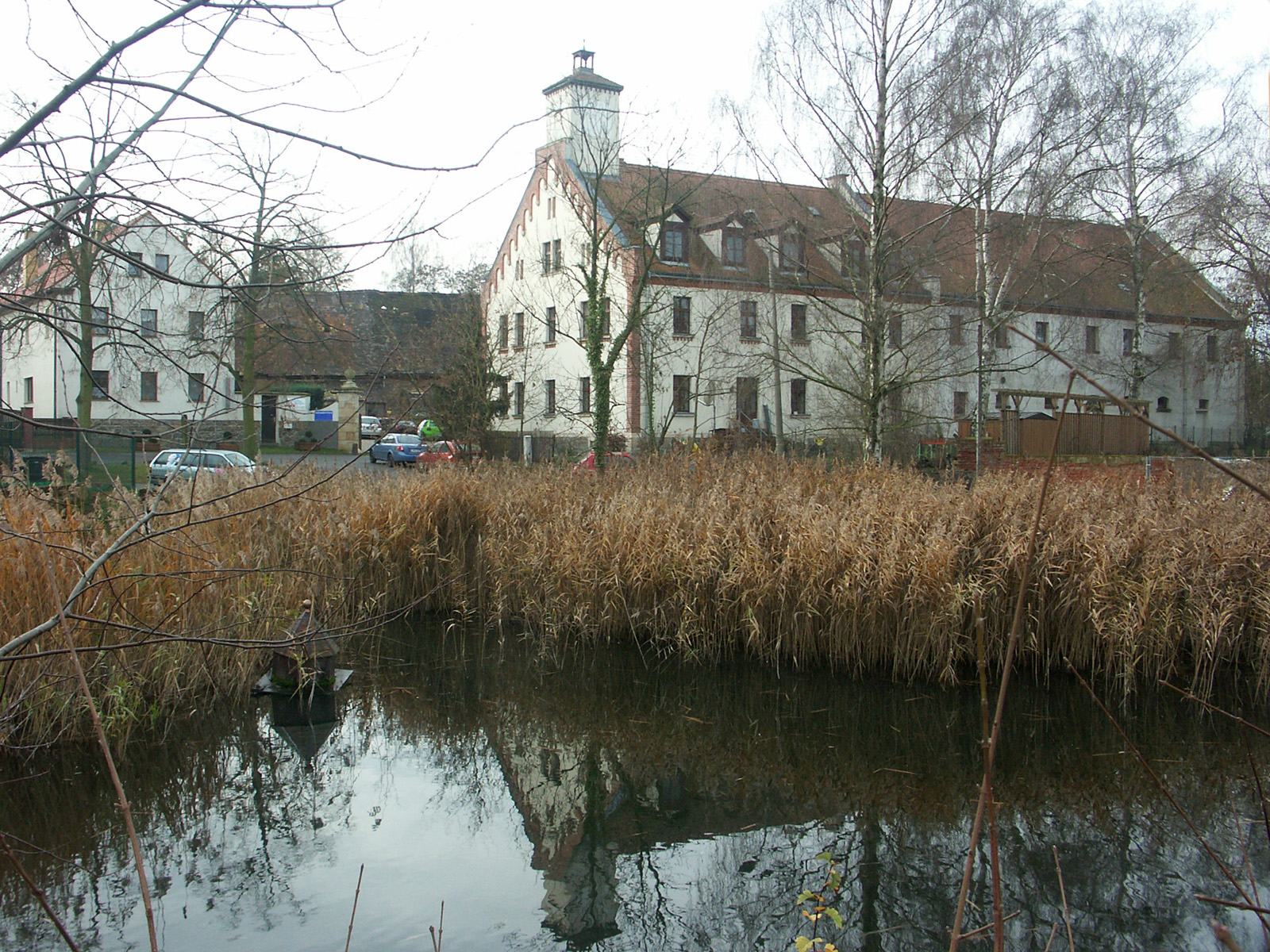 Das ehemalige Stiftsgut in Dösen (Leipzig)